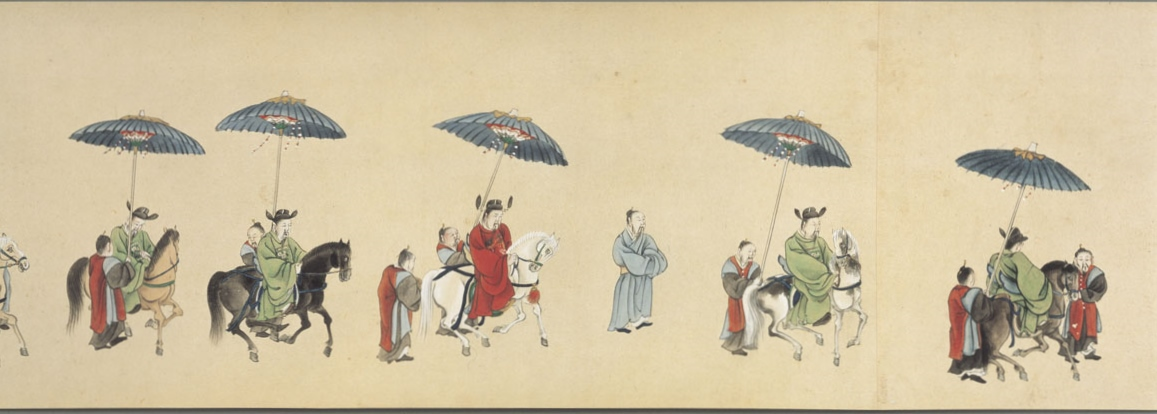 中文（香港）: 琉球赴江戶使節